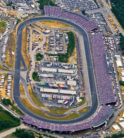 Vue aérienne du circuit automobile New Hampshire Motor Speedway